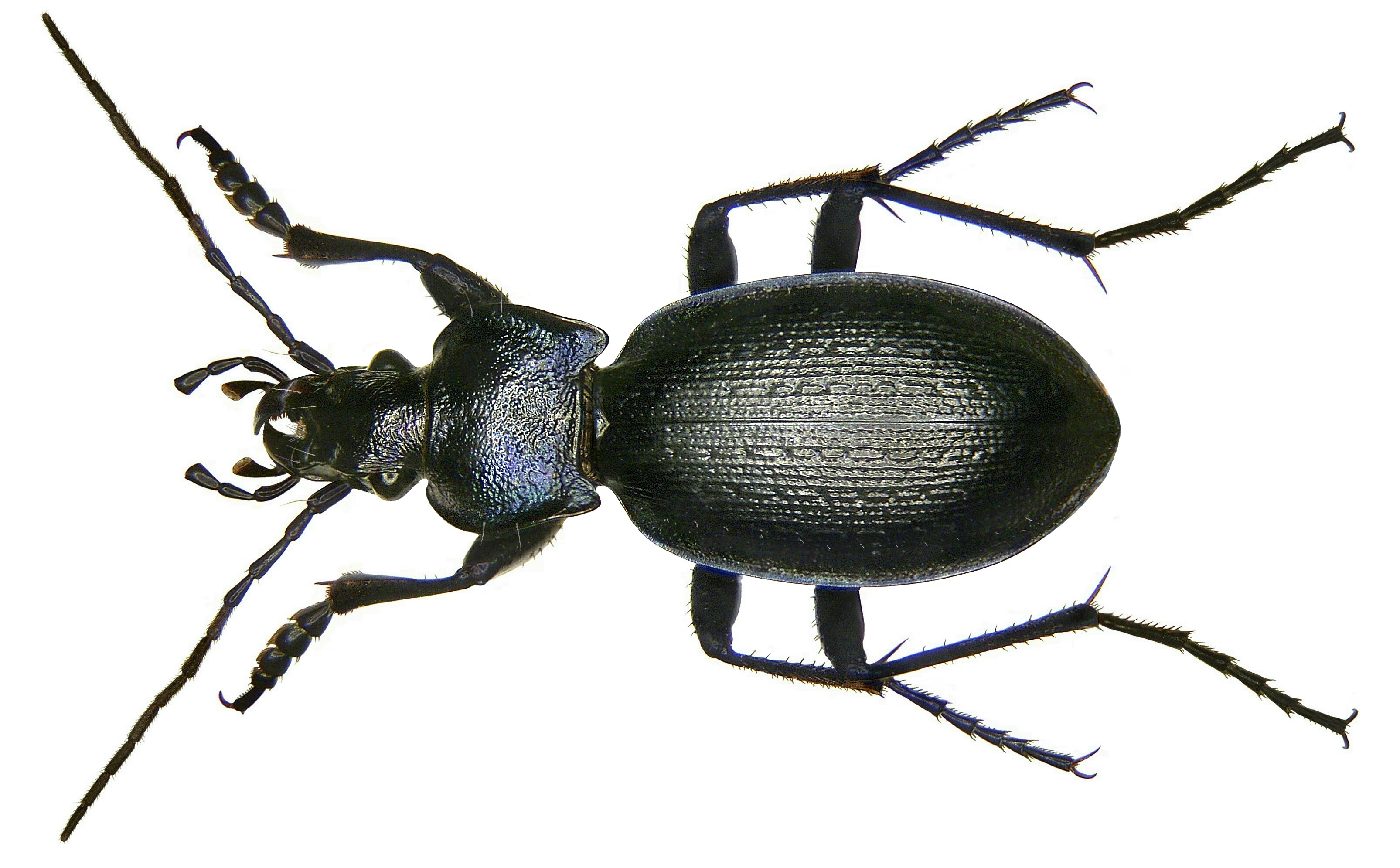 Familie: Carabidae Grösse: 20-30 mm Verbreitung: Europa Ökologie: Waldbewohner Fundort: Germania, Bayern, Oberfranken, Selbitz leg.det. U.Schmidt, 2006 Foto: U.Schmidt, 2008